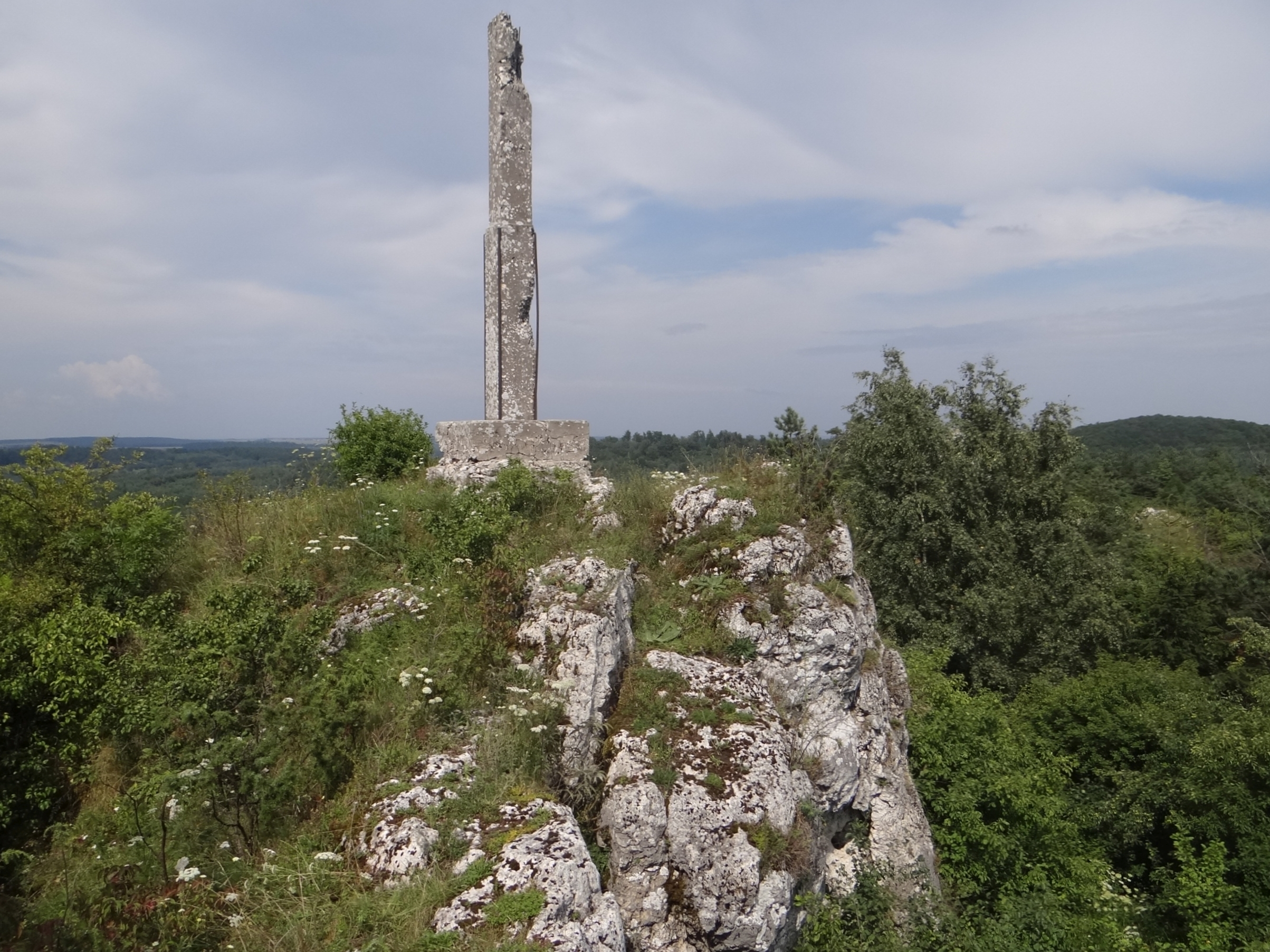 Straszykowe Skały na szczycie Straszykowej Góry